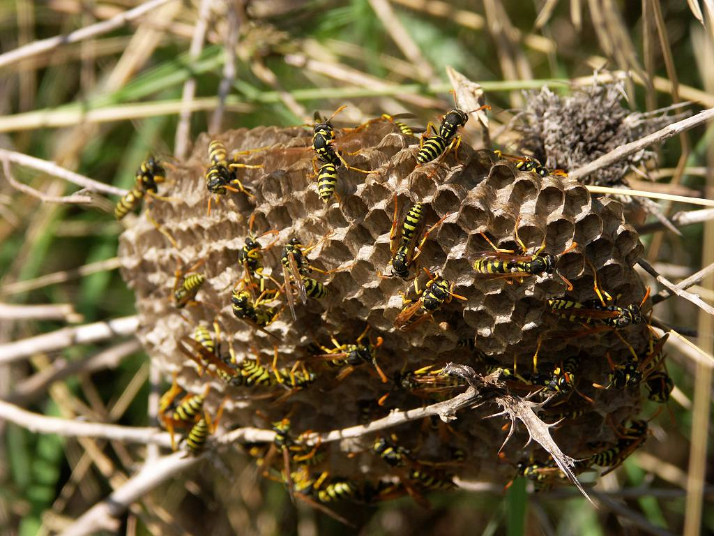 Descripción: Nido de avispas (Collserola, Barcelona, lado mar) Fecha: 22/09/2004 Hora: 13:27 Cámara: DiMAGE A2 ISO: 64 Tv: 1/500 Av: 4.5 Autor: aTarom